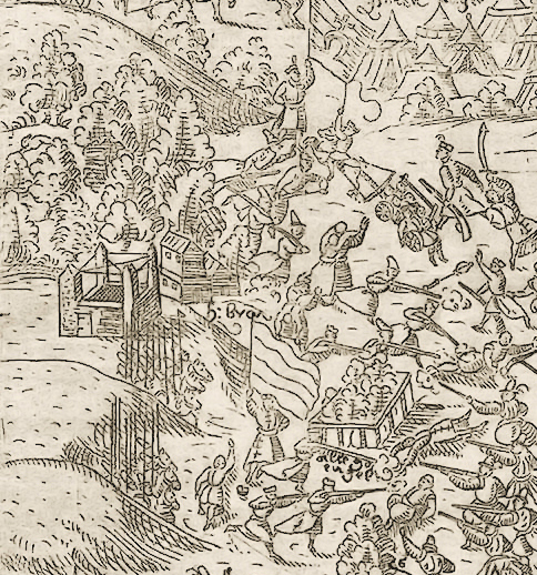 Fragment ryciny z 1577 r. przedstawiającej wojnę Stefana Batorego z Gdańskiem (Biblioteka Gdańska PAN)